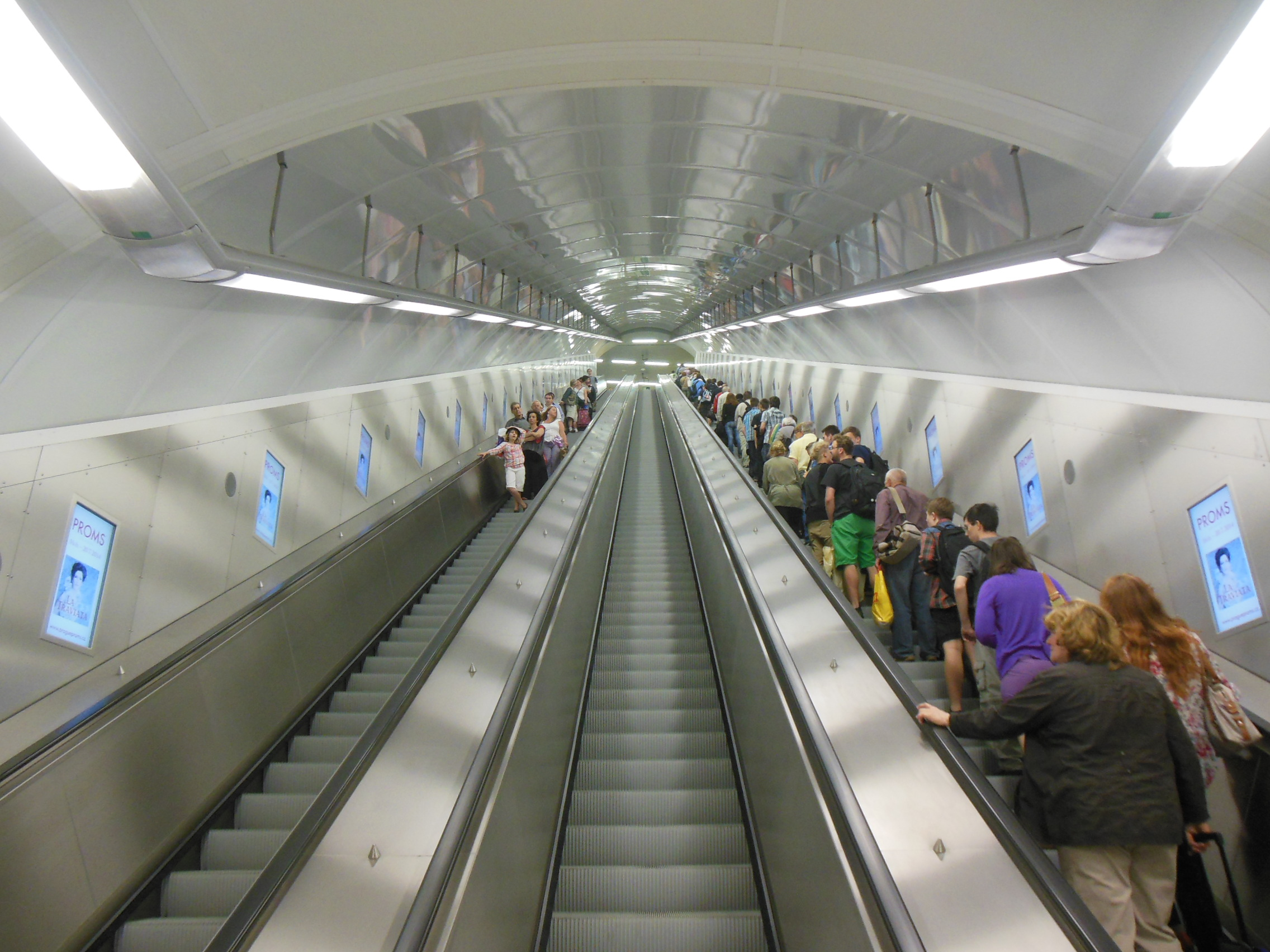 Praha-Nové Město. Stanice metra B Národní třída, stav po rekonstrukci 2012-2014, eskalátory do mezipatra.